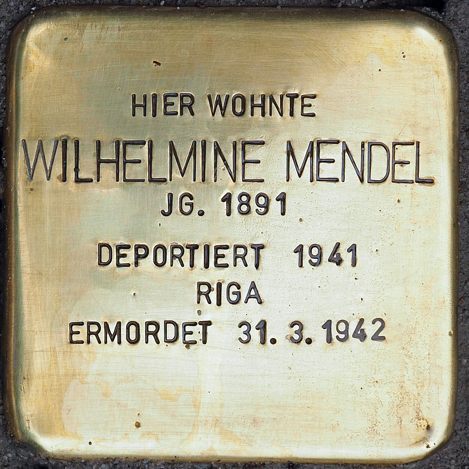 Stolpersteine in Kempen: Mendel, Wilhelmine